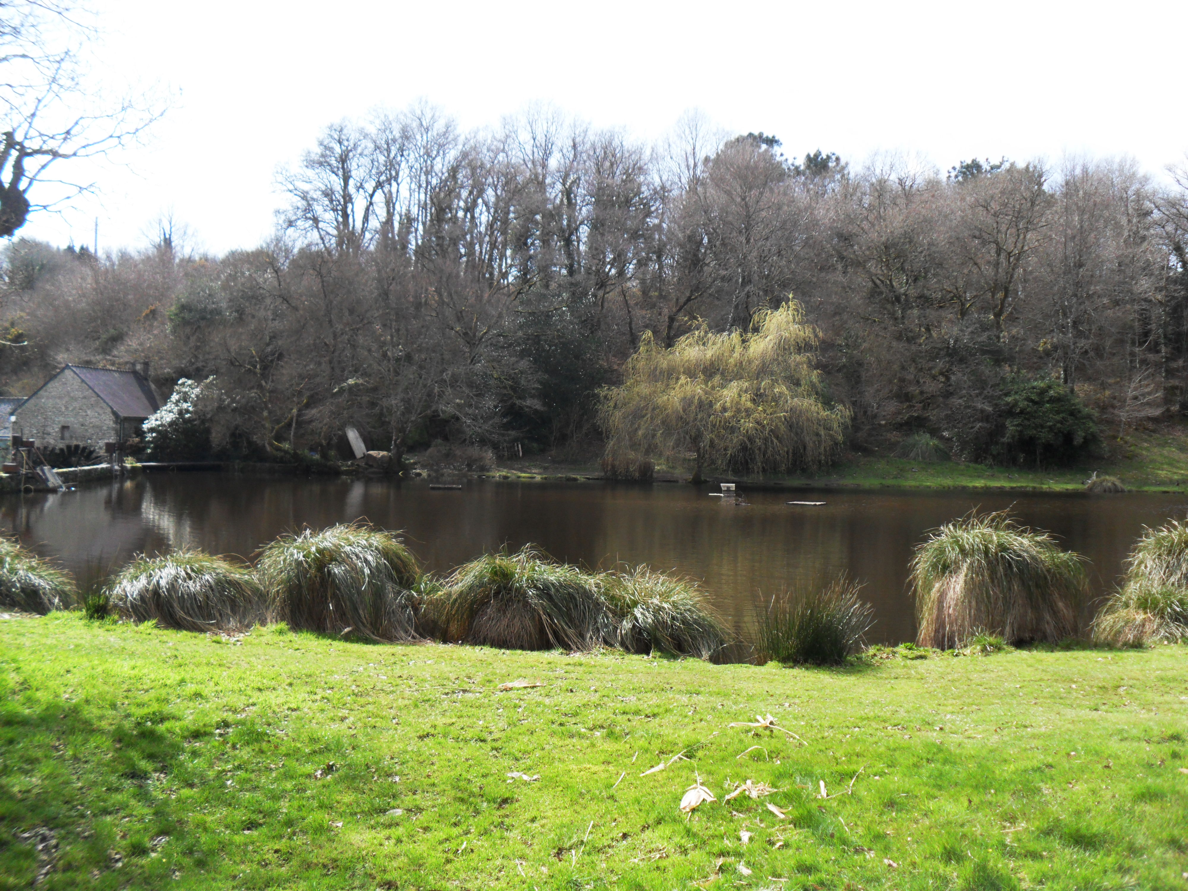 Moulin dans la nature de baye, Finistère (France)